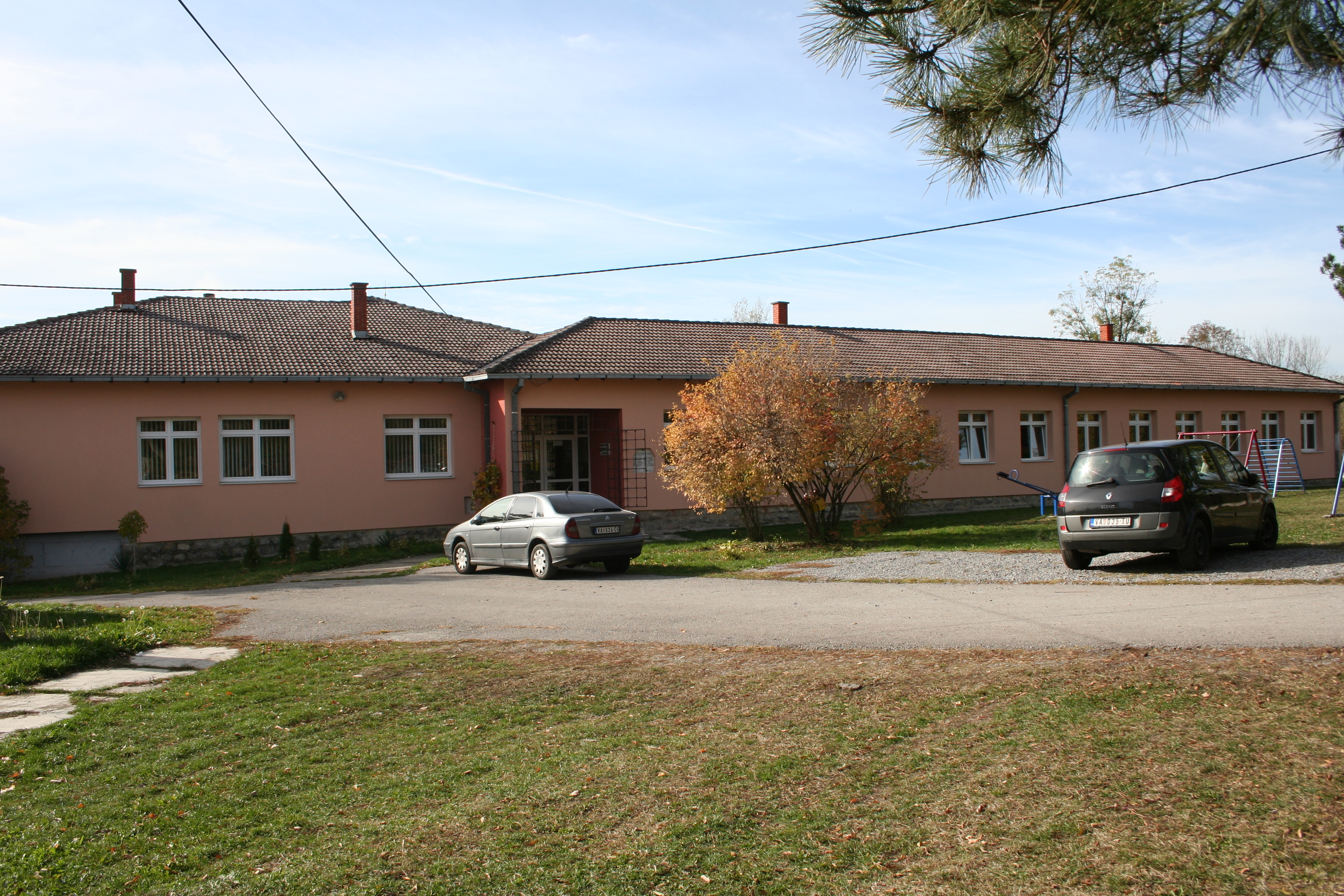 OŠ Sveti Sava Popučke